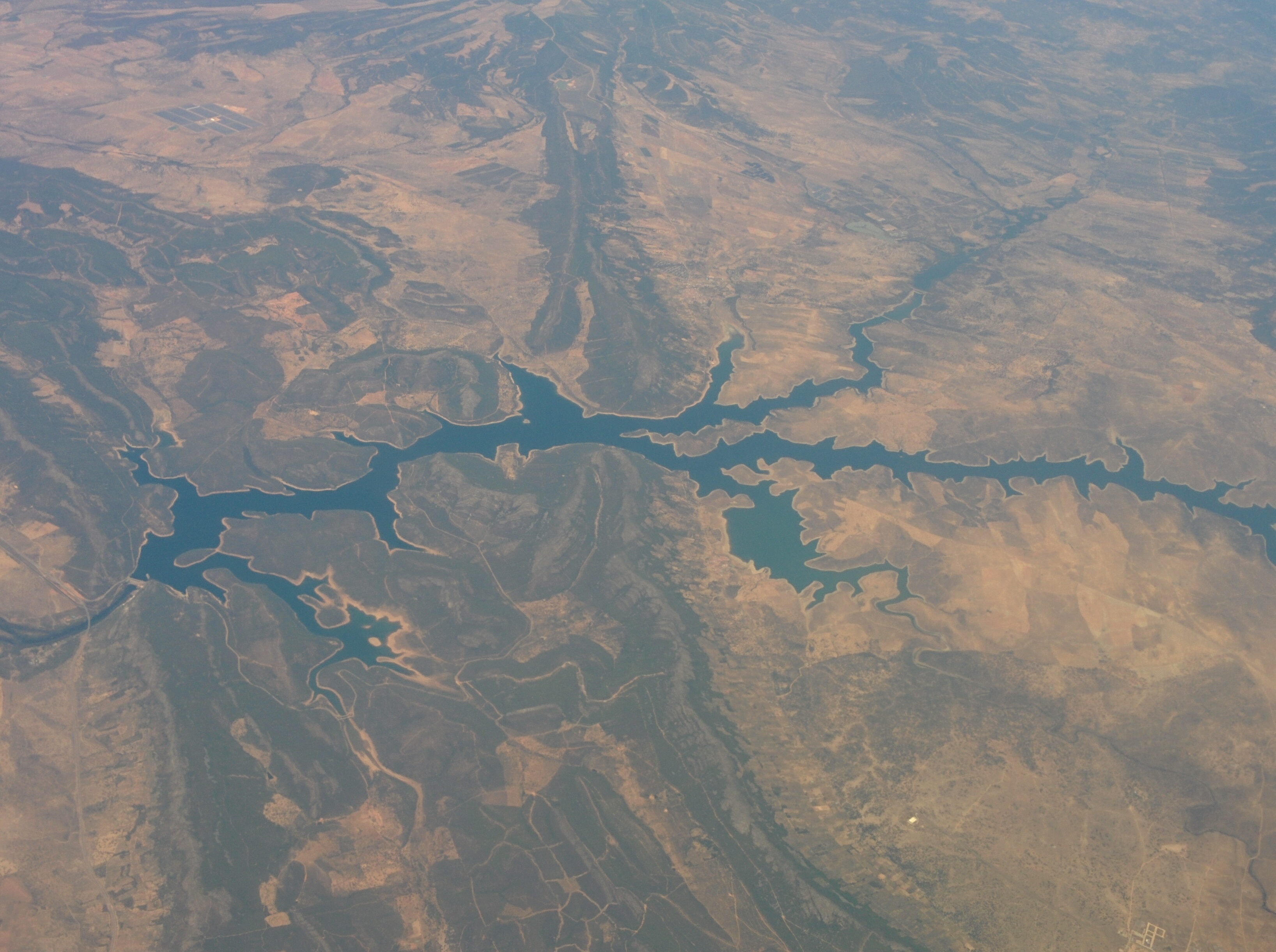 Vista aérea del embalse García de Sola, en Badajoz (España).